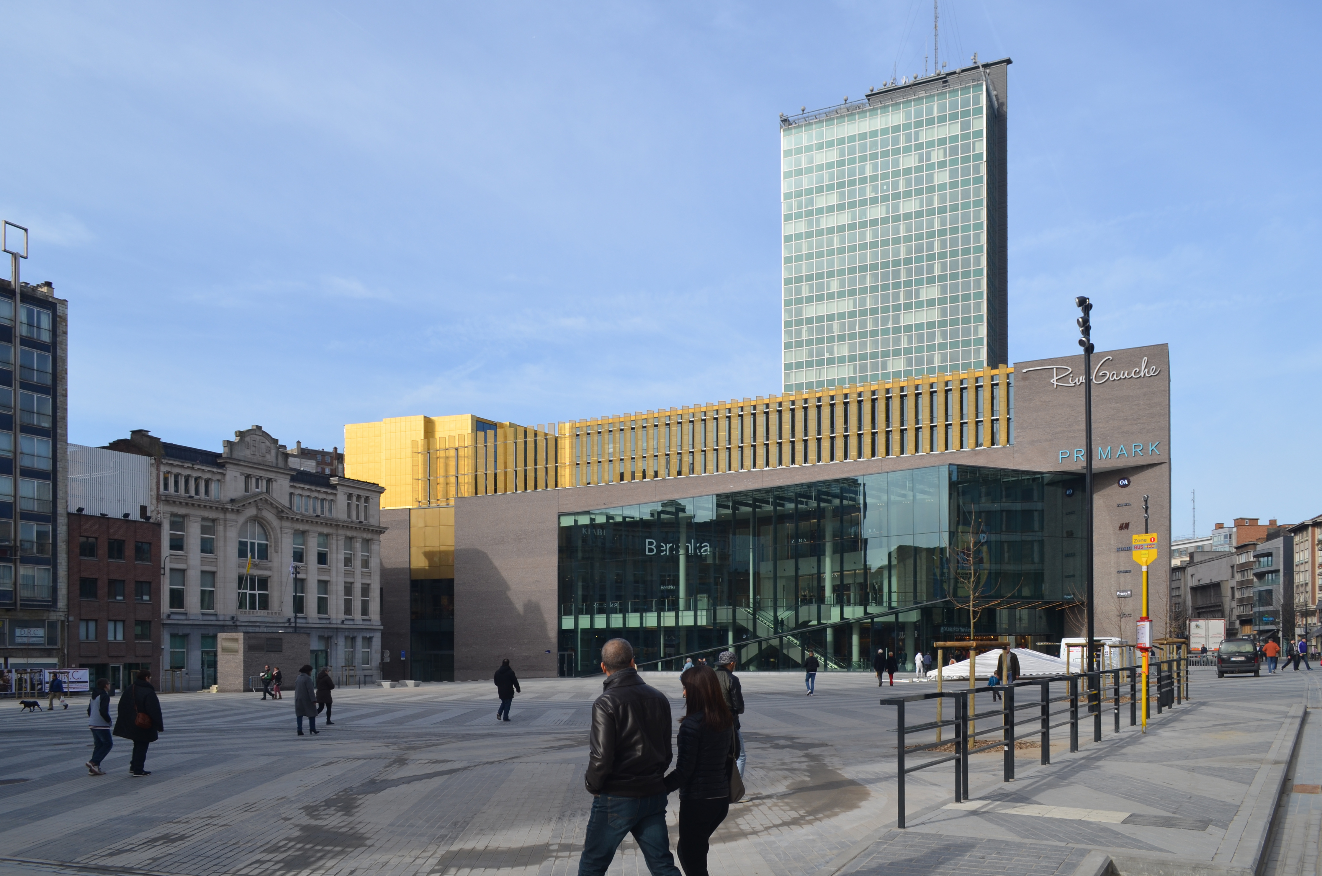 Charleroi - Centre commercial « Rive Gauche ». Vue depuis la Place Verte.